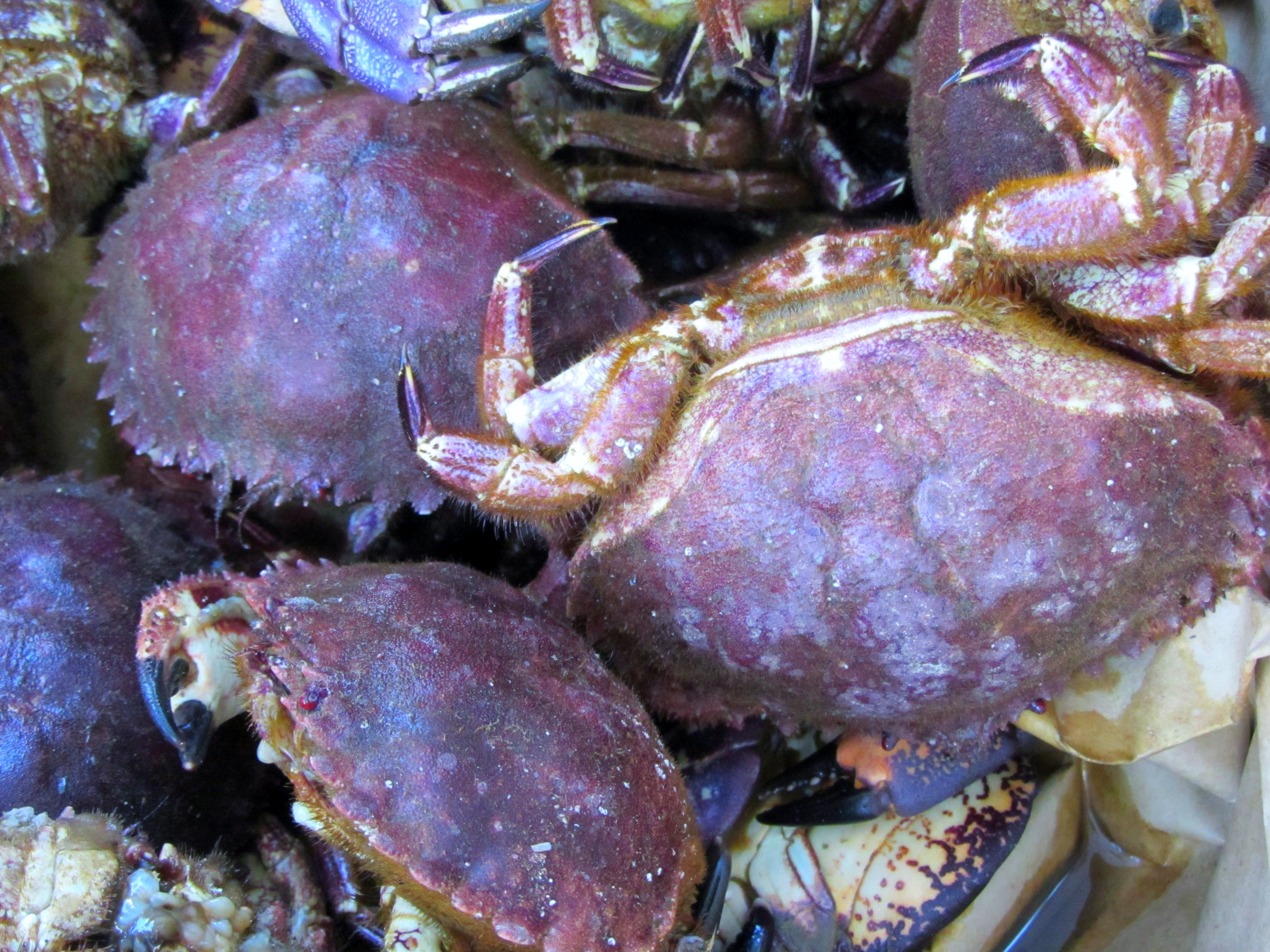 Venta de jaibas marmolas (Cancer edwardsi) en una calle de Valparaiso